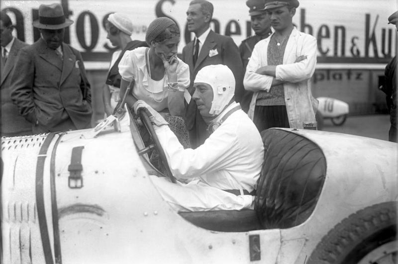 Grosses Internationales Autorennen auf der Avus in Berlin! Der bekannte Herrem-Rennfahrer Hermann Prinz zu Leiningen auf Bugatti beim Training zu dem grossen Internationalen Automobilrennen auf der Avus.